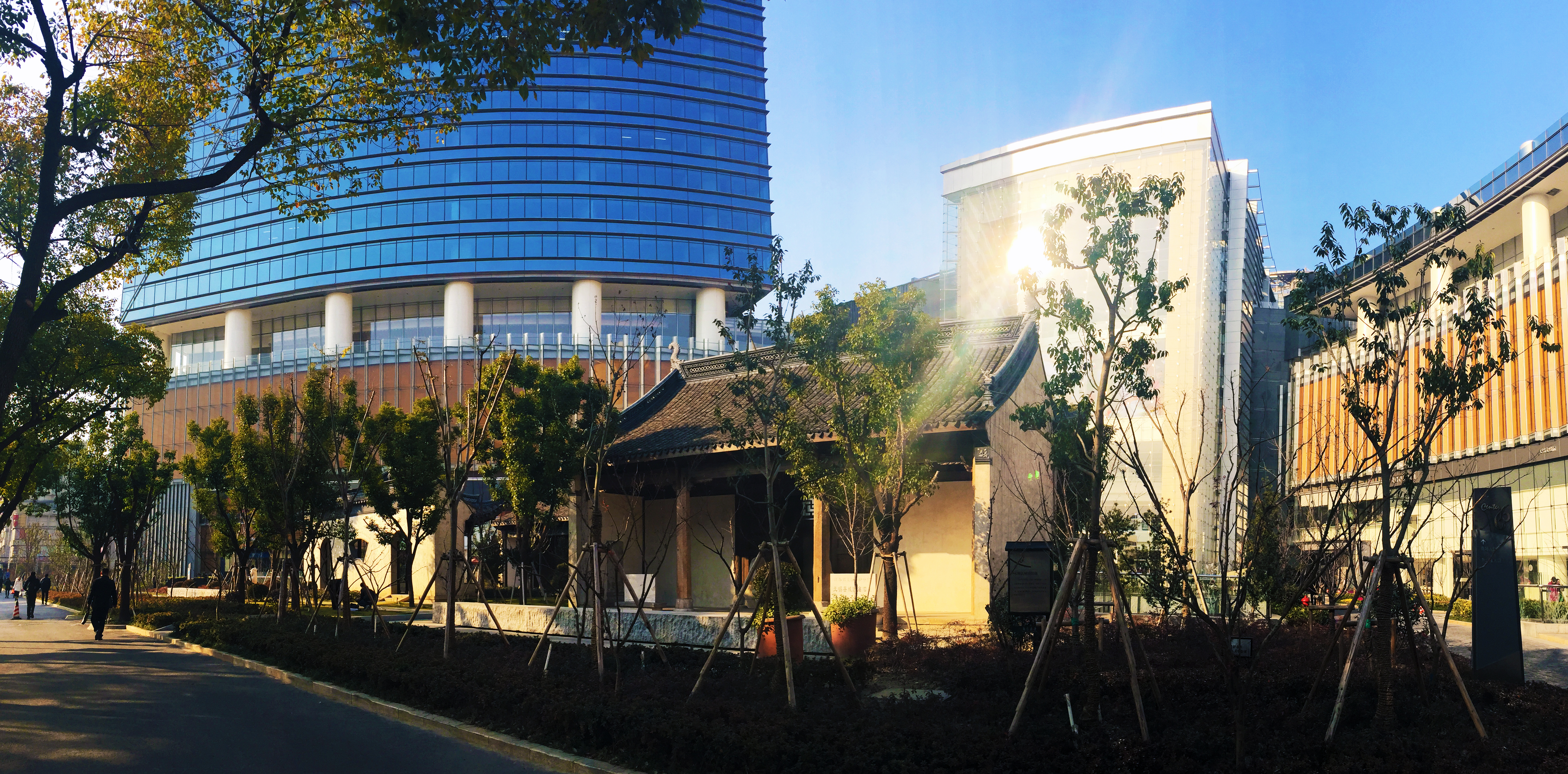 位於後西溪恆隆廣場南廣場的無錫城隍廟舊址